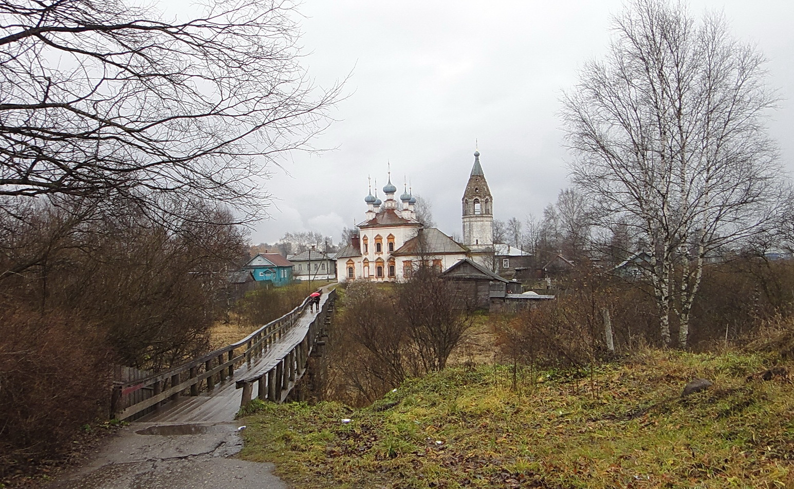 Церковь Благовещения (Вологодская область, Устюжна, улица Корелякова, 10 (Трудовой коммуны улица))